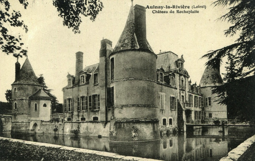 Château de Rocheplatte, Aulnay-la-Rivière, Loiret, Centre, France